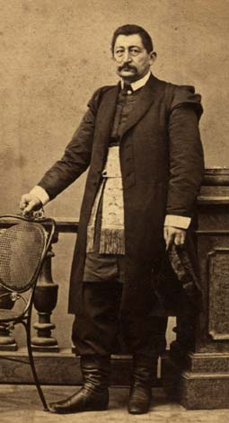 Kajetan Agopsowicz (1814-1874) poseł do Sejmu Krajowego Galicji